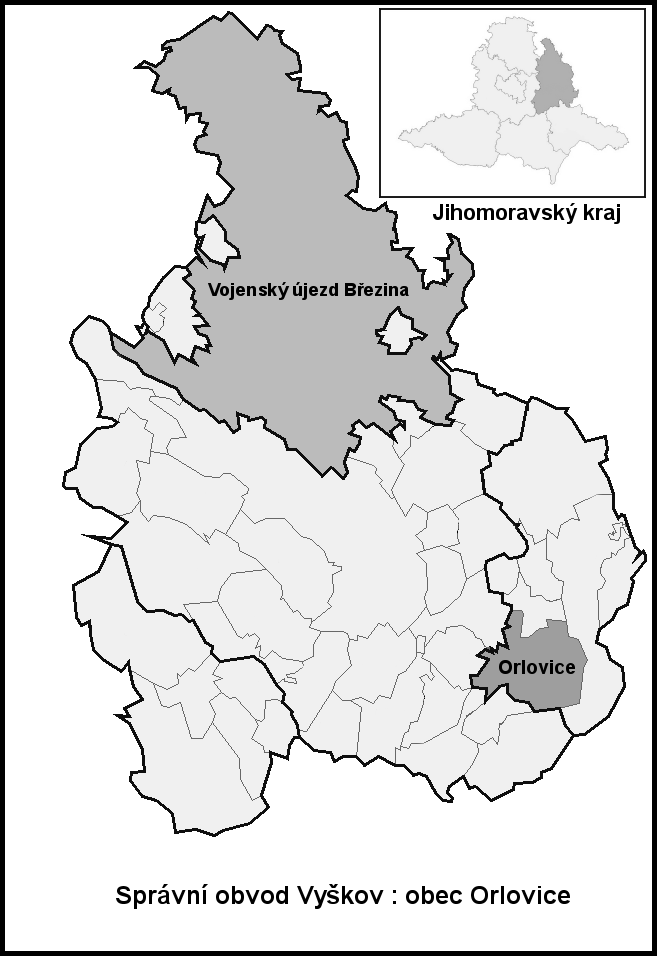 Hranice Orlovice (Vyškov- czech republic)